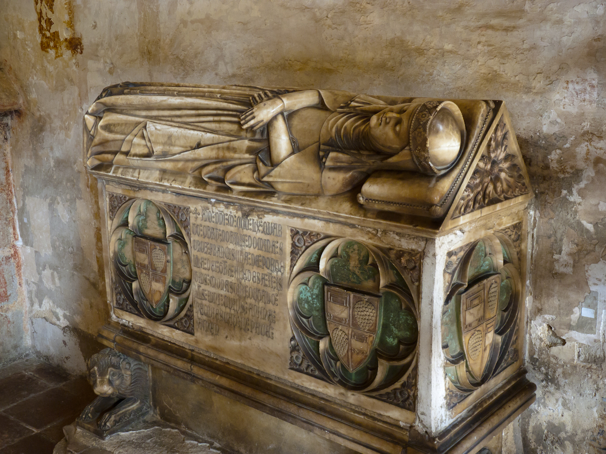 Barcelona Claustro 23 02 de julio de 2011